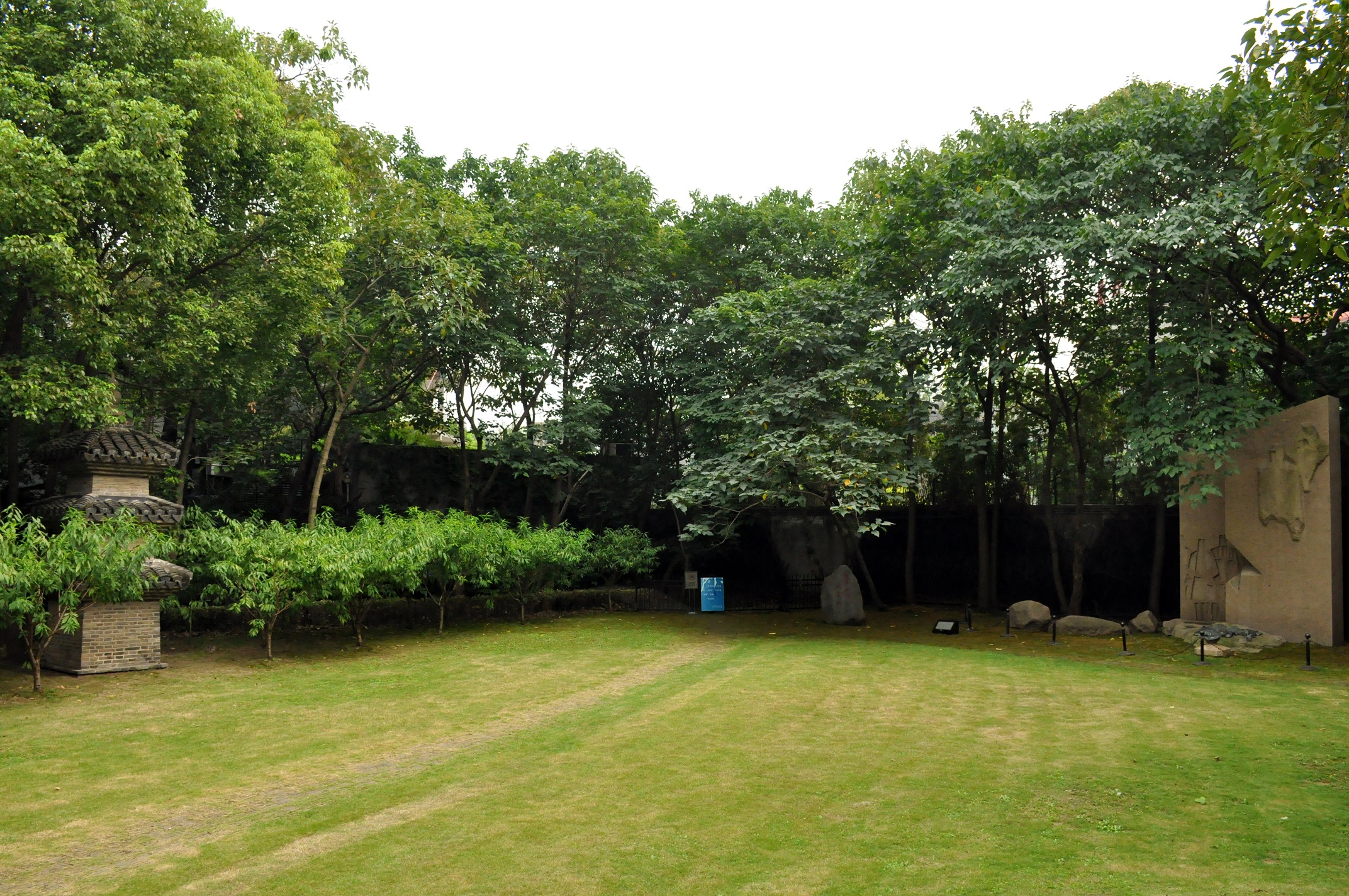 龙华革命烈士就义地 龙华路烈士陵园内 1927年～1937年